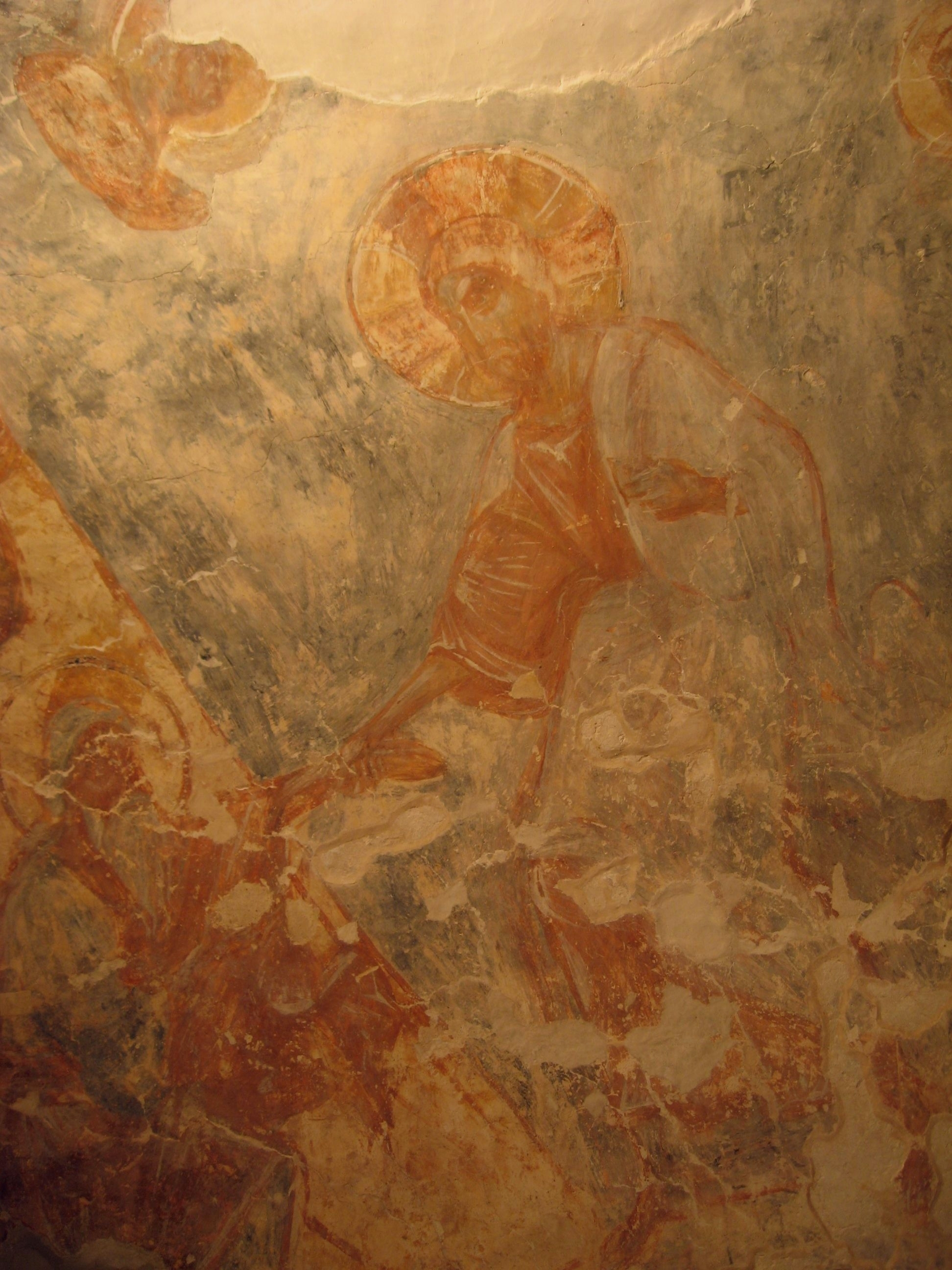 Фреска собора Снетогорского монастыря. 1313 год.